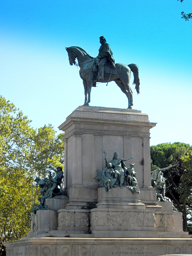 Monumento equestre di Giuseppe Garibaldi al Gianicolo di Roma